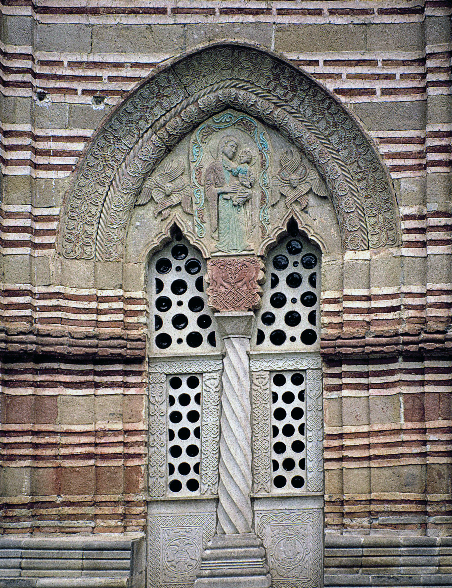 Manastir Kalenić